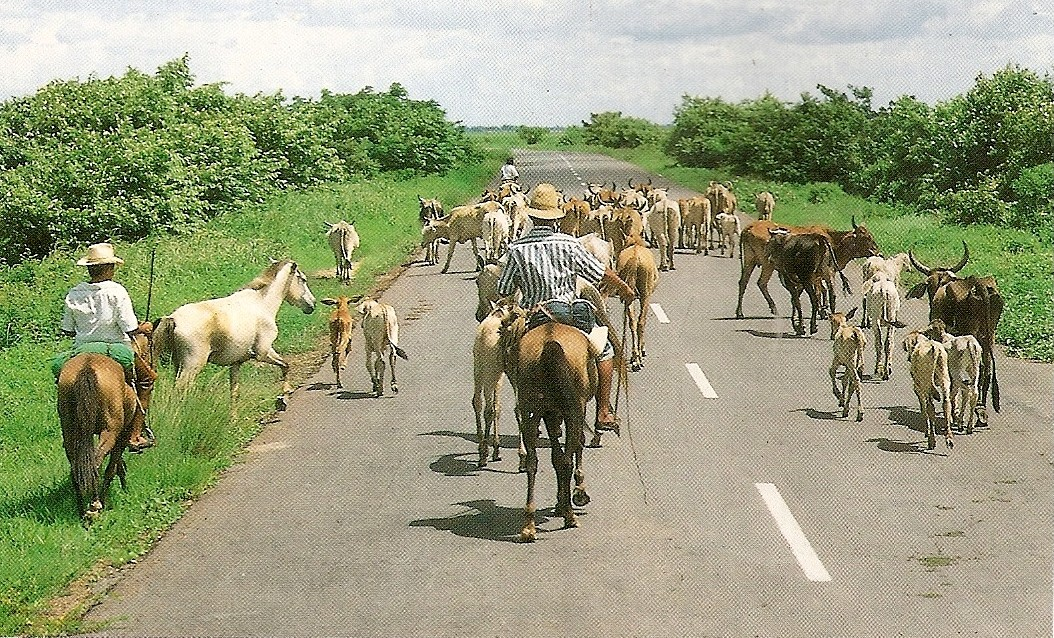 Arreo de ganado en el estado Apure, Venezuela